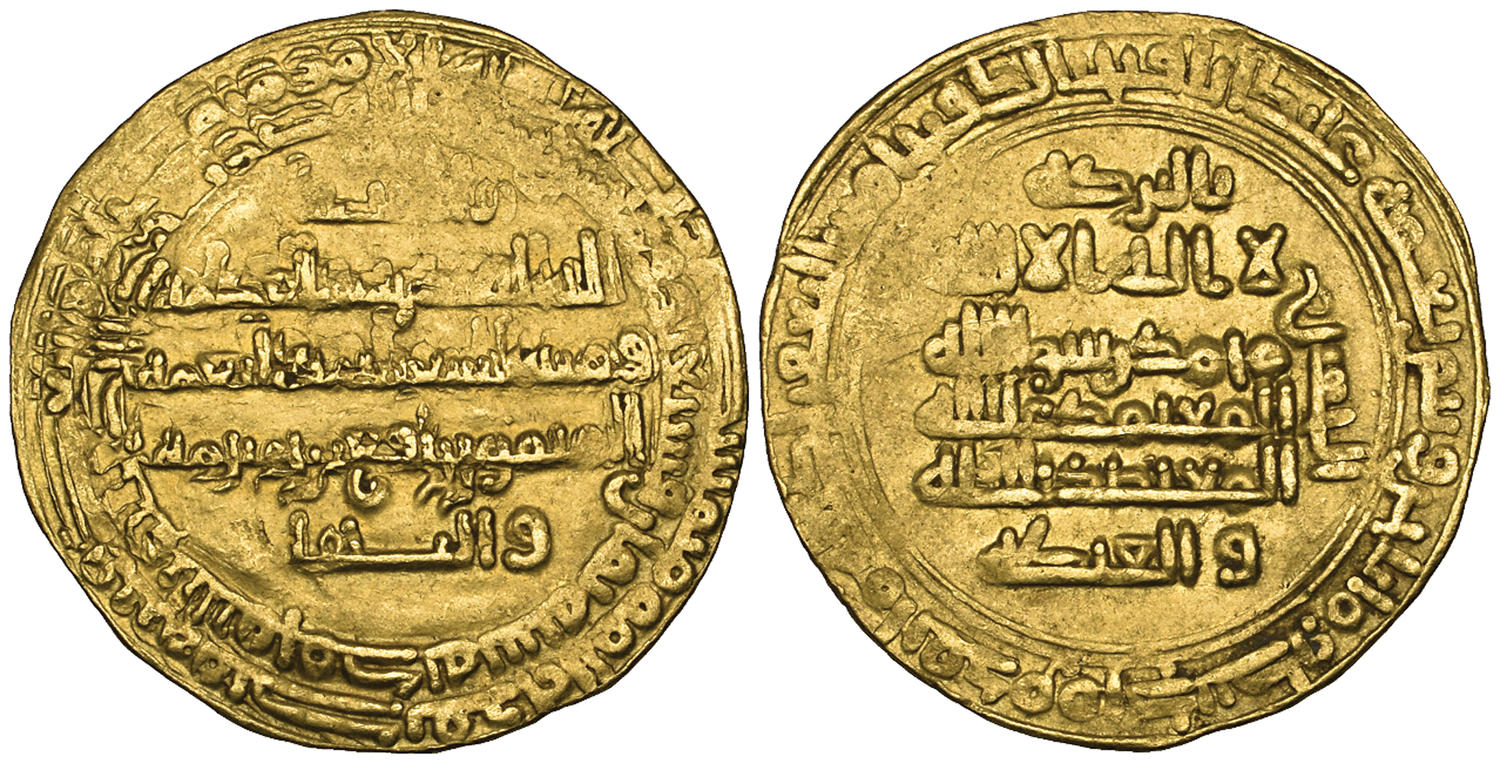 RAFI' B. HARTHAMA (268-283h) Dinar, al-Muhammadiya mint 278h سکه یک دیناری رافع بن هرثمه ضرب محمدیه (ری) در سال 278 هجری به وزن 4.23 گرم روی سکه: حاشیه سوره روم آیات 4 و 5 مرکز: بالثنا/لله القدرة و العظمة/و منه السعادة و النعمة/المنصور رافع بن هرثمة/و البها پشت سکه: حاشیه سوره فتح آیات 1 و 2 مرکز: بالبرکة/لا اله الا الله/محمد رسول الله/المعتمد علی الله/المعتضد بالله/و الغبطة